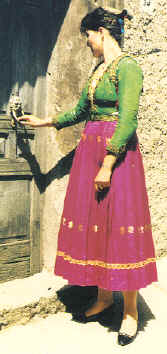 Abito tradizionale arberesh